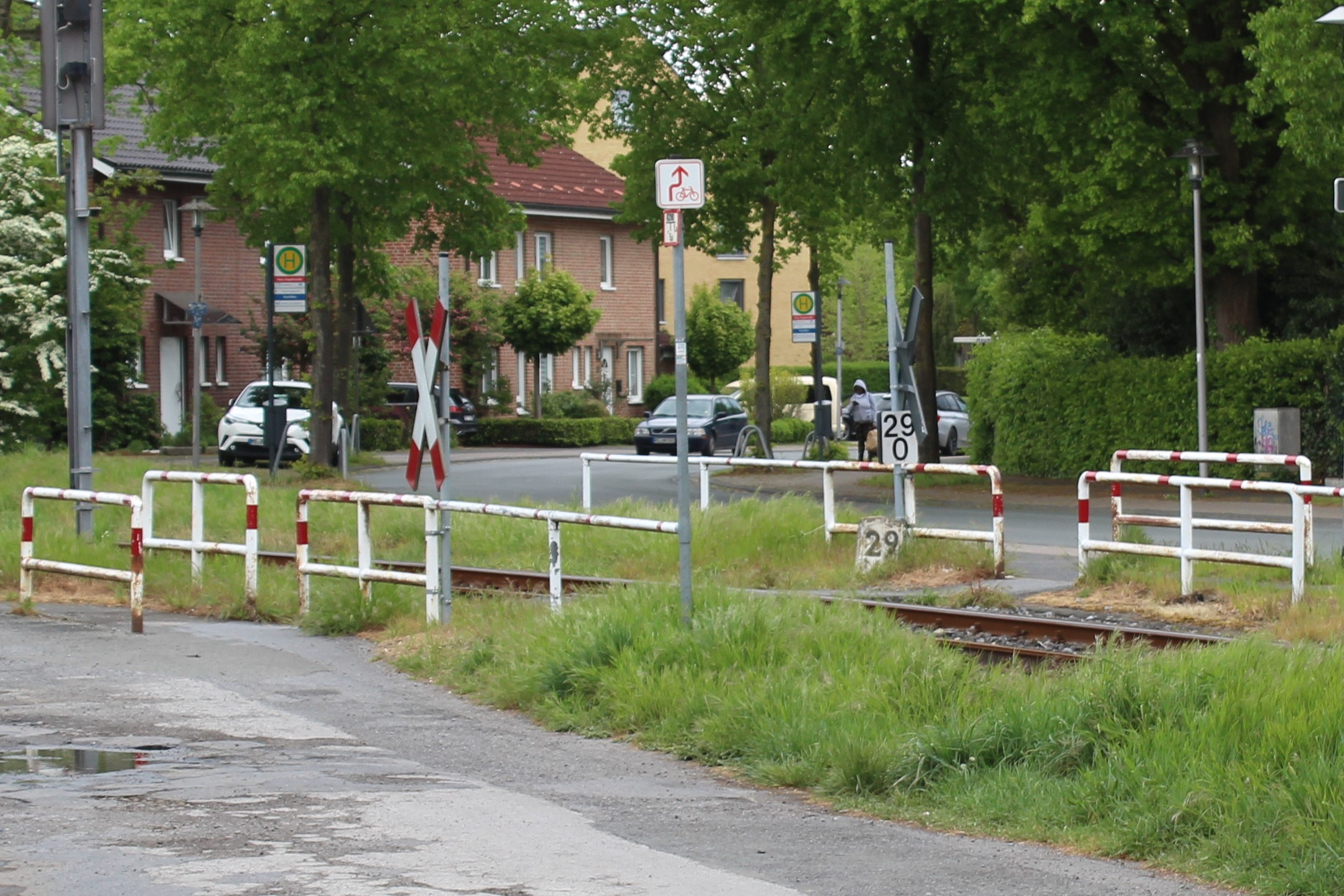 Bahnübergang Angelstraße/Twenhövenweg erst seit 2019 mit einem Andreaskreuz gesichert.